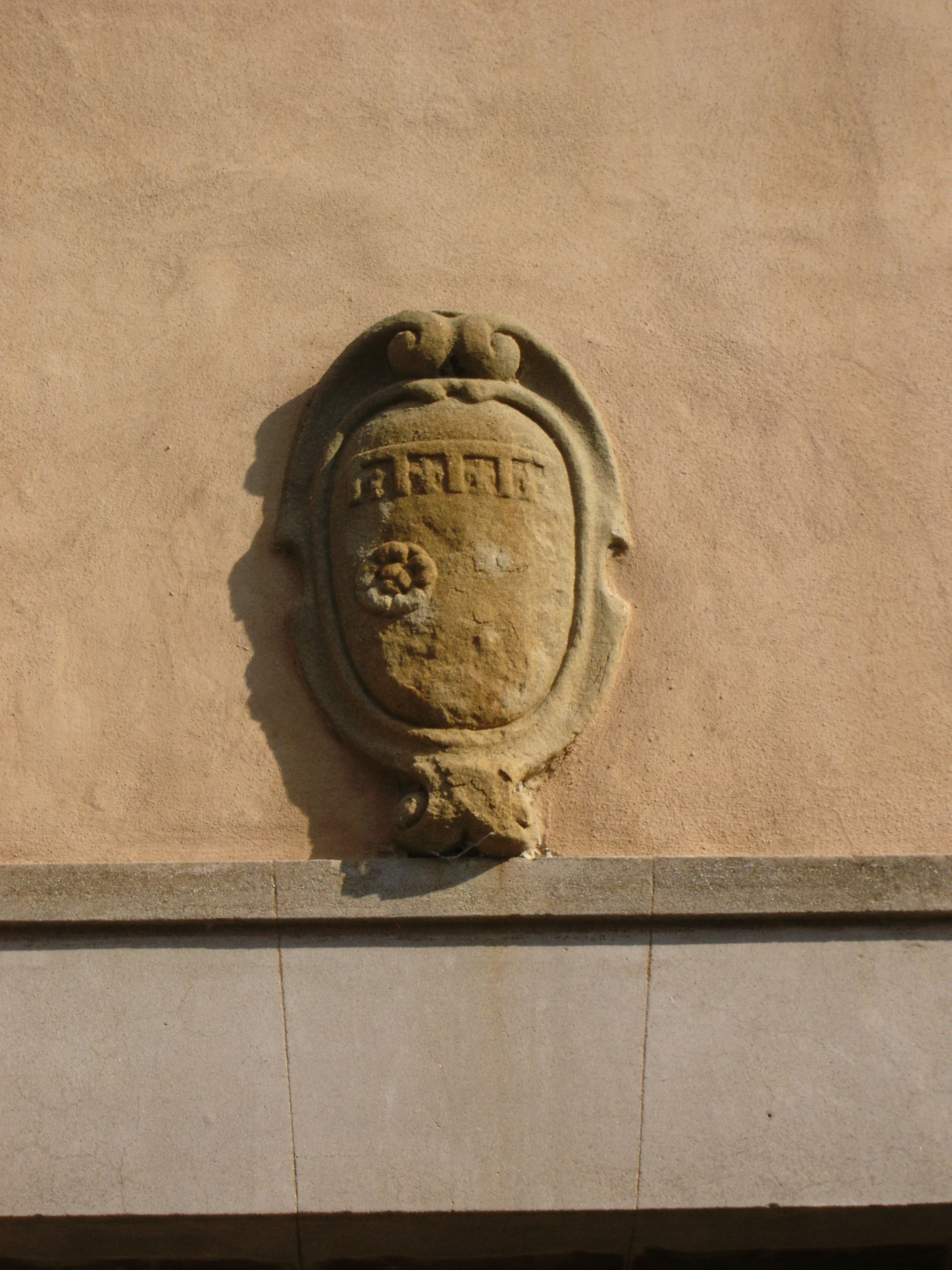 Certaldo Stemma pieve san giovanni battista in jerusalem